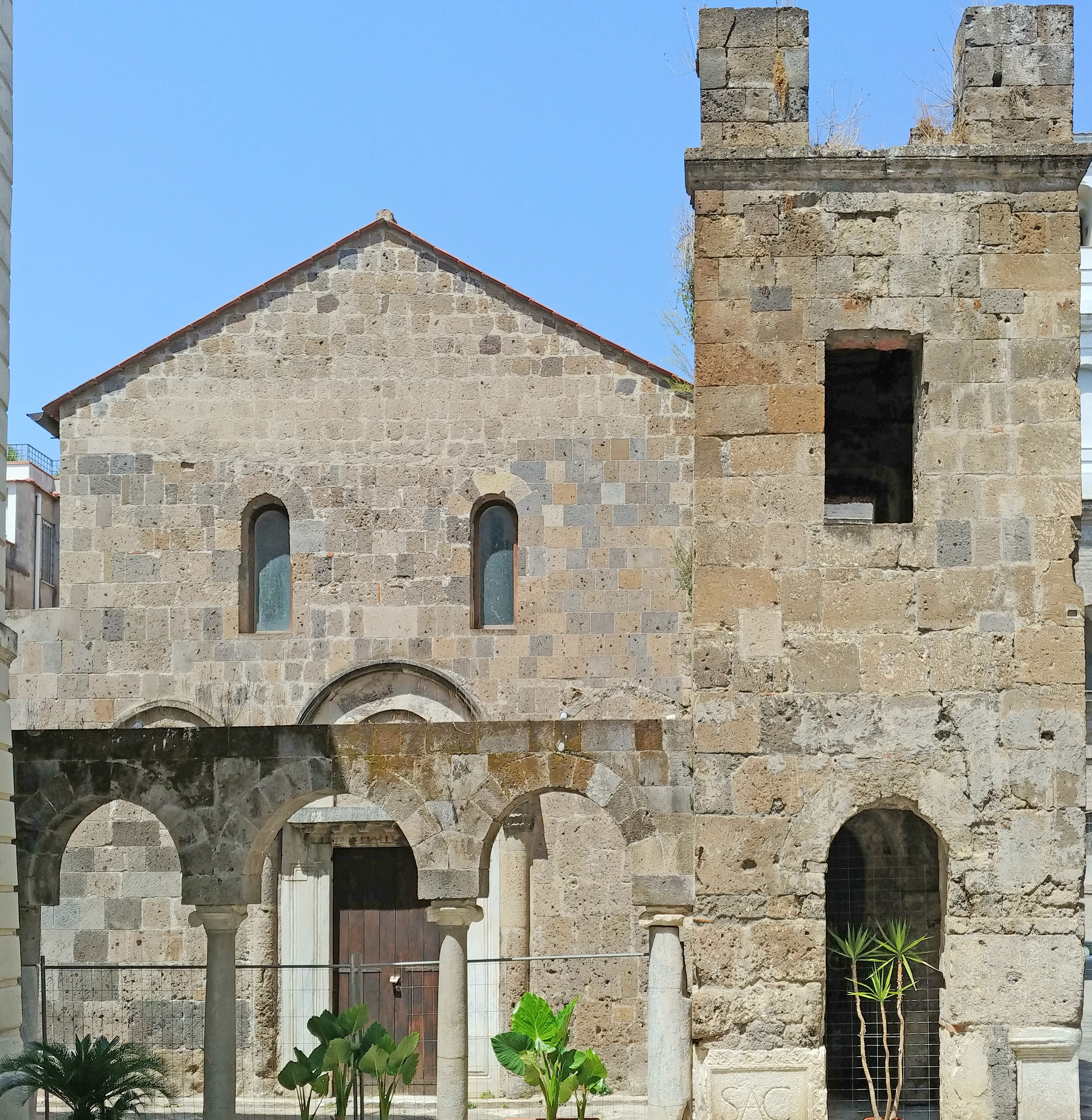 Facciata e campanile.